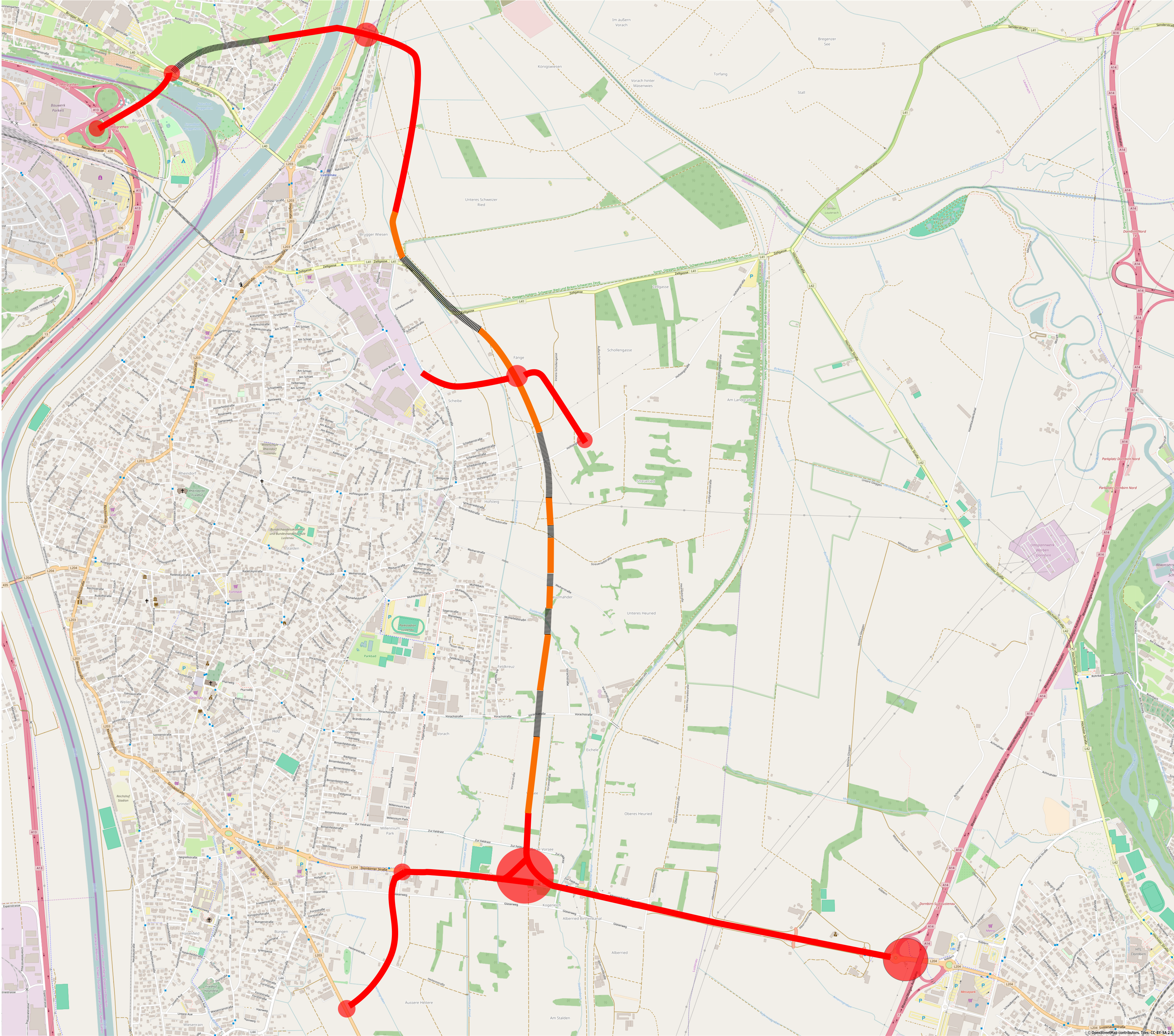 Planung Bodensee SchnellstraßeSchwarz strichliert: Tunnelstrecken Orange: Trogstraßen mit Lärm- u. Hochwasserschutz